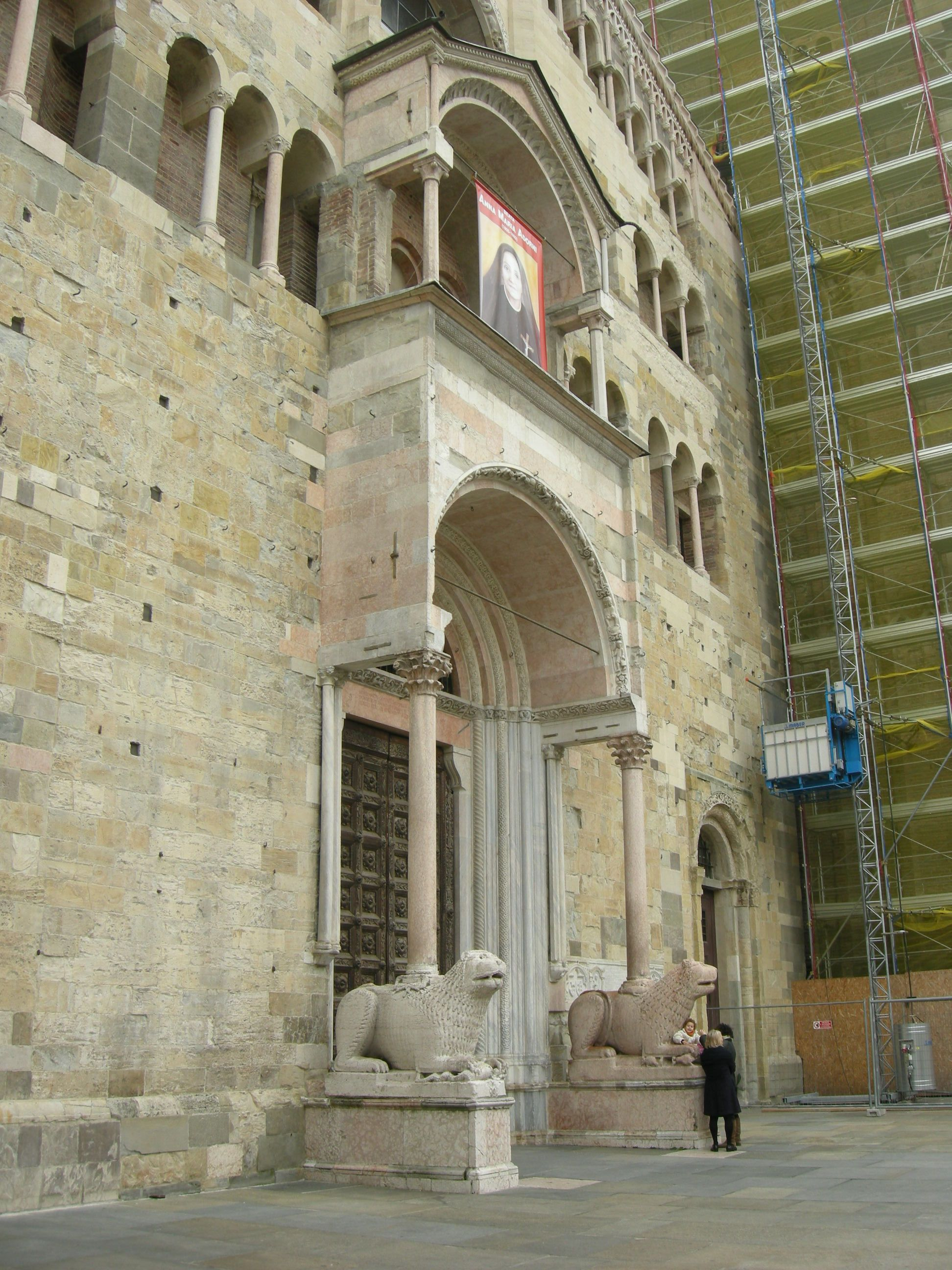 Duomo di parma, facciata